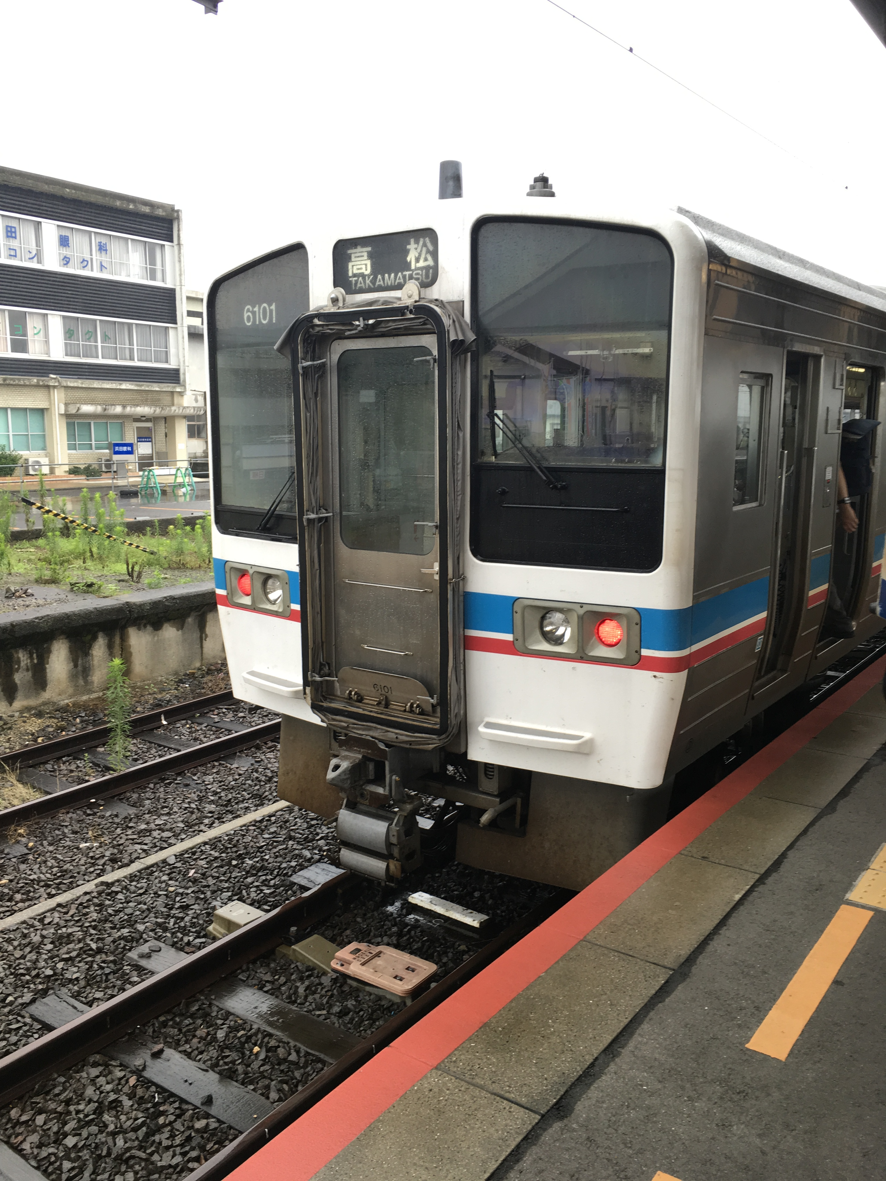 中文（中国大陆）: 拍摄于琴平站，可以看到6000系车头以及下行方向特有的三相连接器